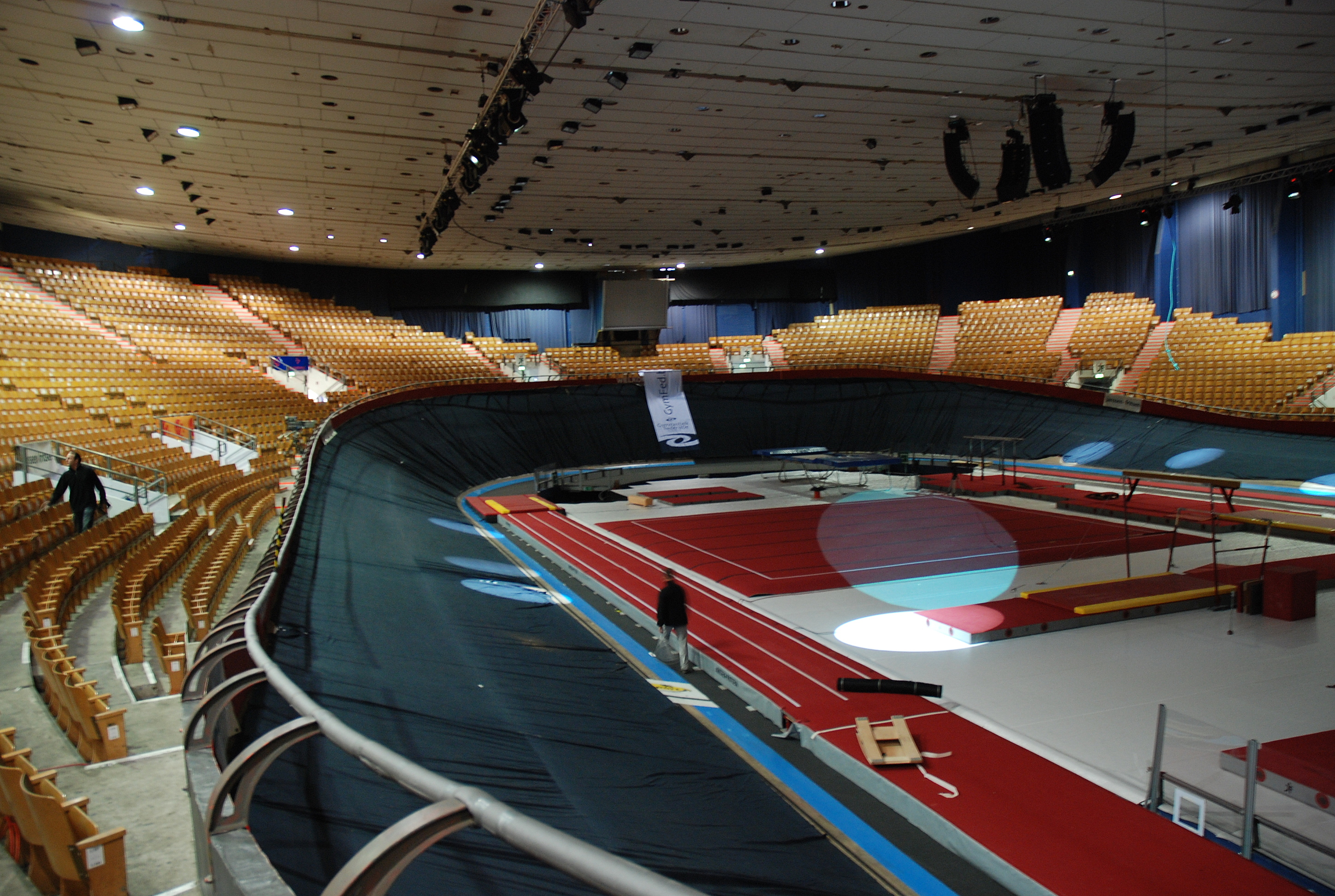 De velodroom het Kuipke in Gent, België